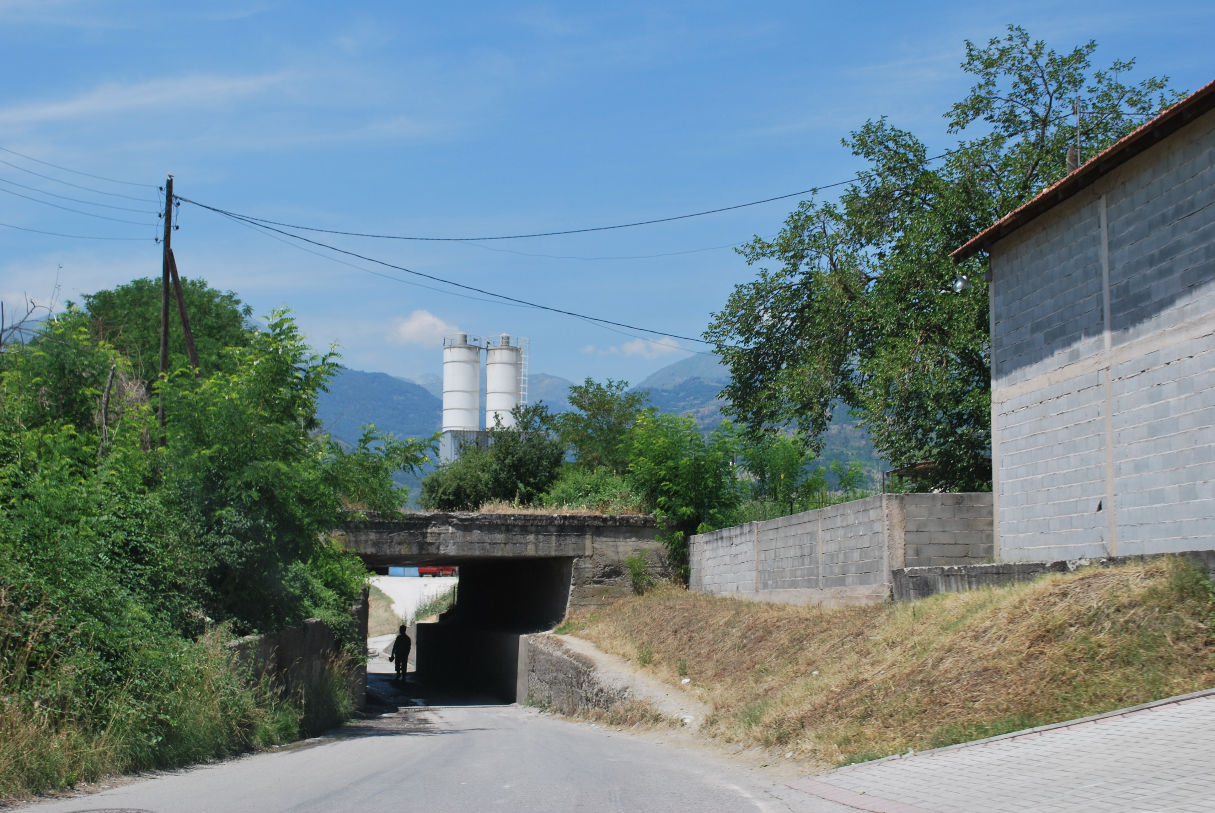 Žerovjane, Tetovo